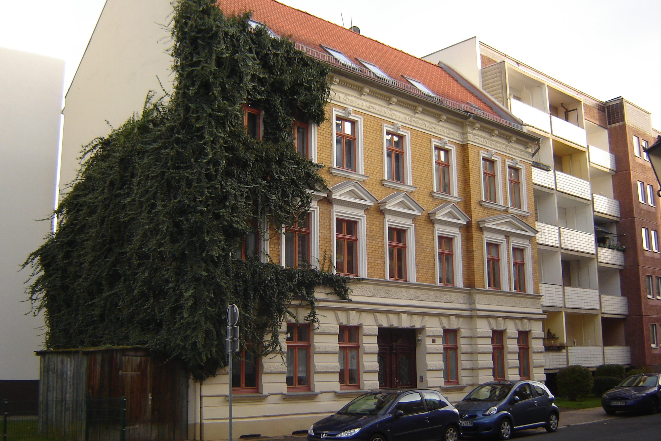 Magdeburg, Abendstraße 12 (Kulturdenkmal)